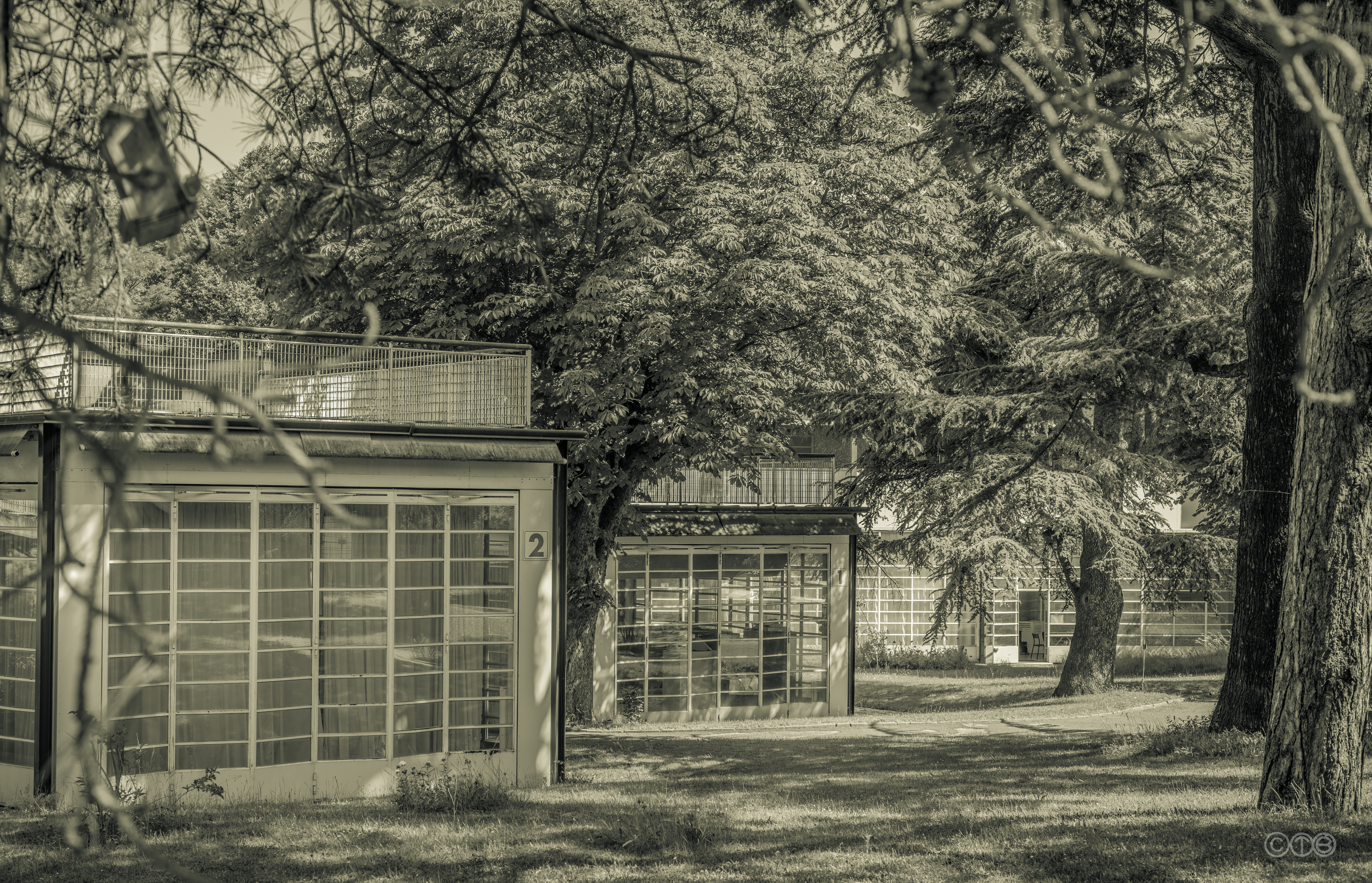 Ecole de plein Air, Suresnes